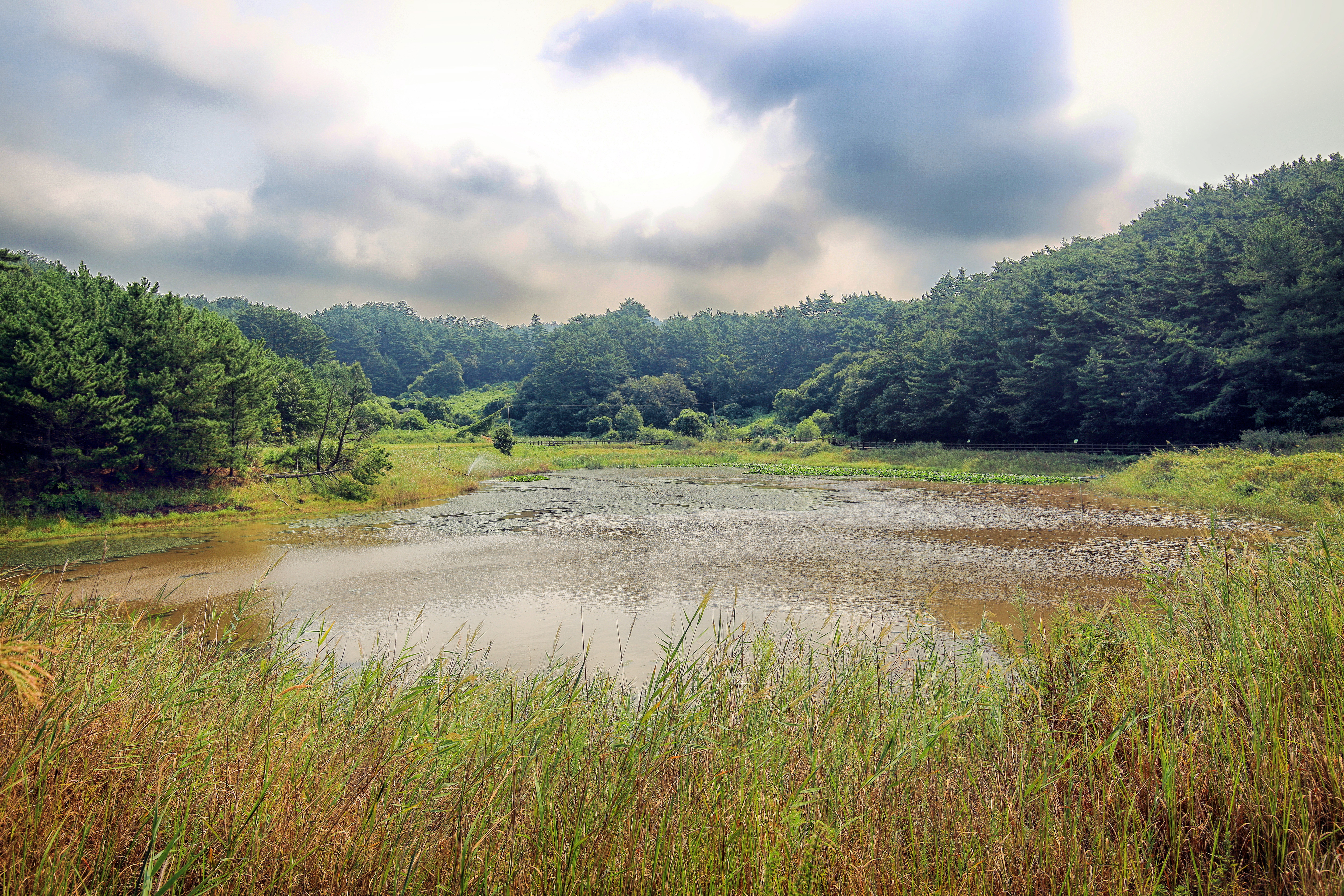 조선말: 국내 최초로 습지보호구역으로 지정된 사구습지